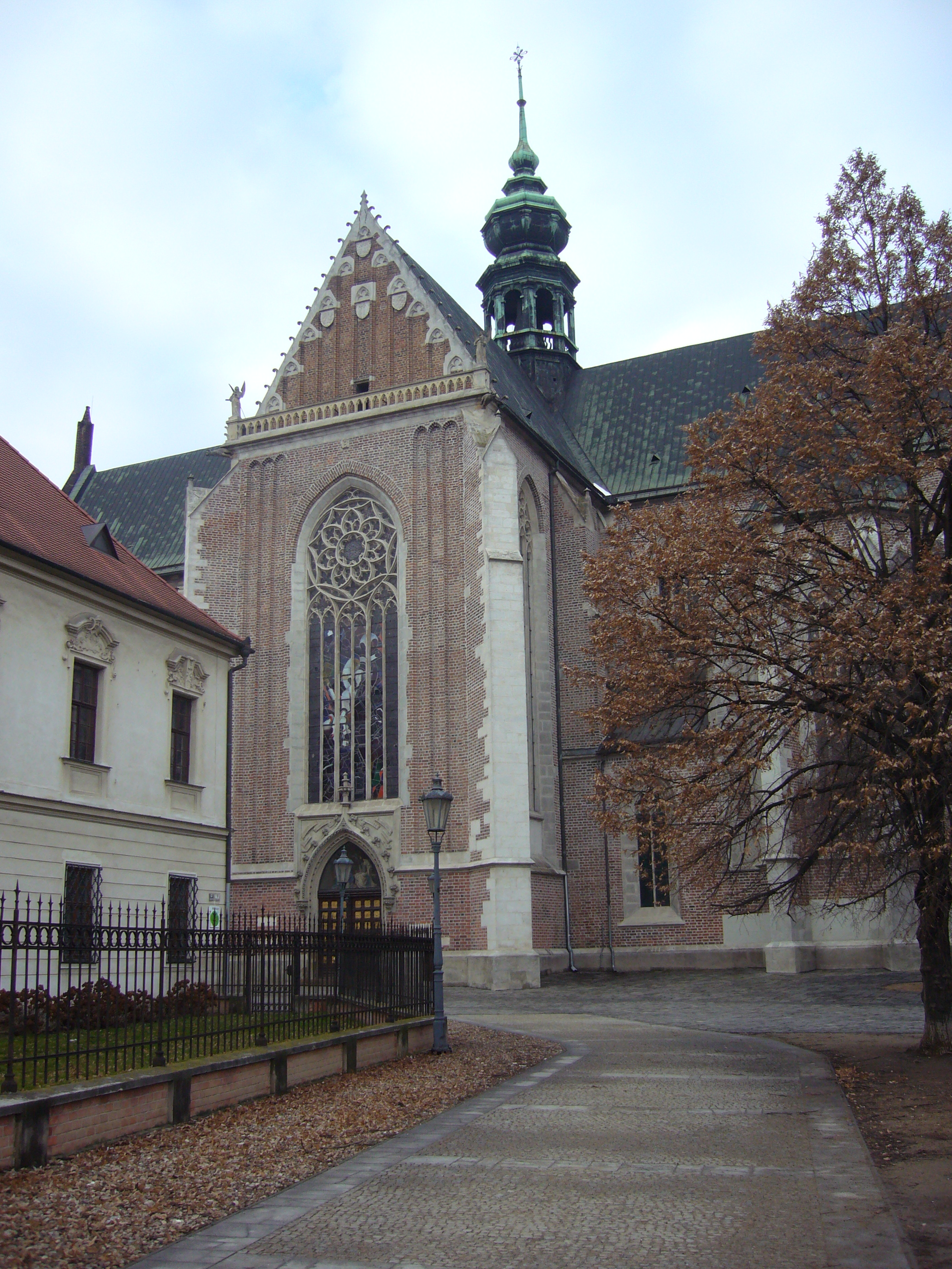 Basilica minor at Old Brno Mendel´s square